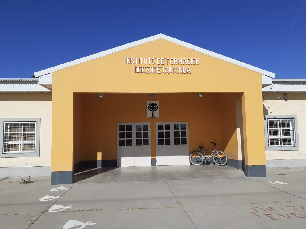 Instituto de Formación Docente y Continua de Luis Beltrán, Provincia de Rio Negro.